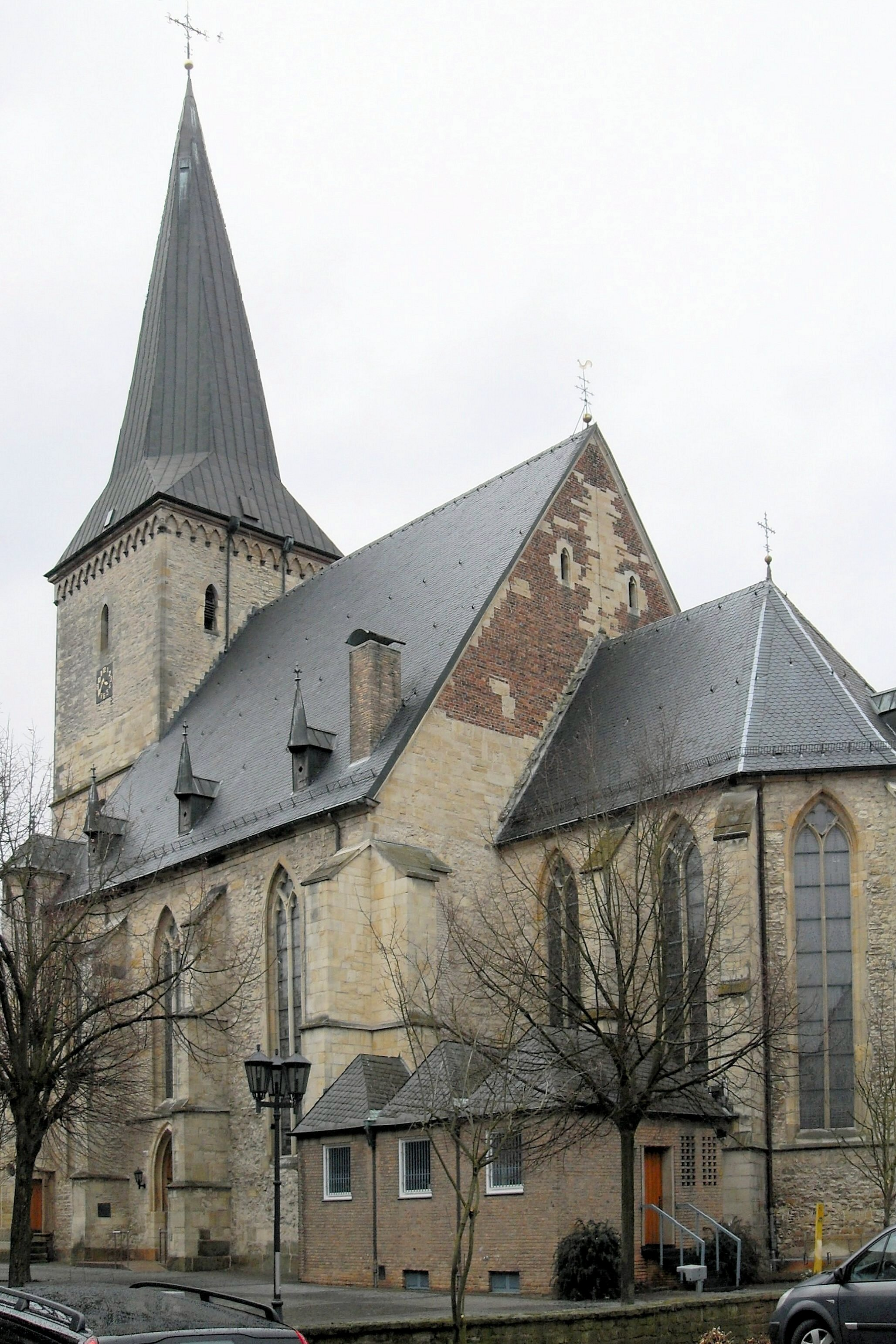 Nordseite der Kirche St. Gertrud in Horstmar